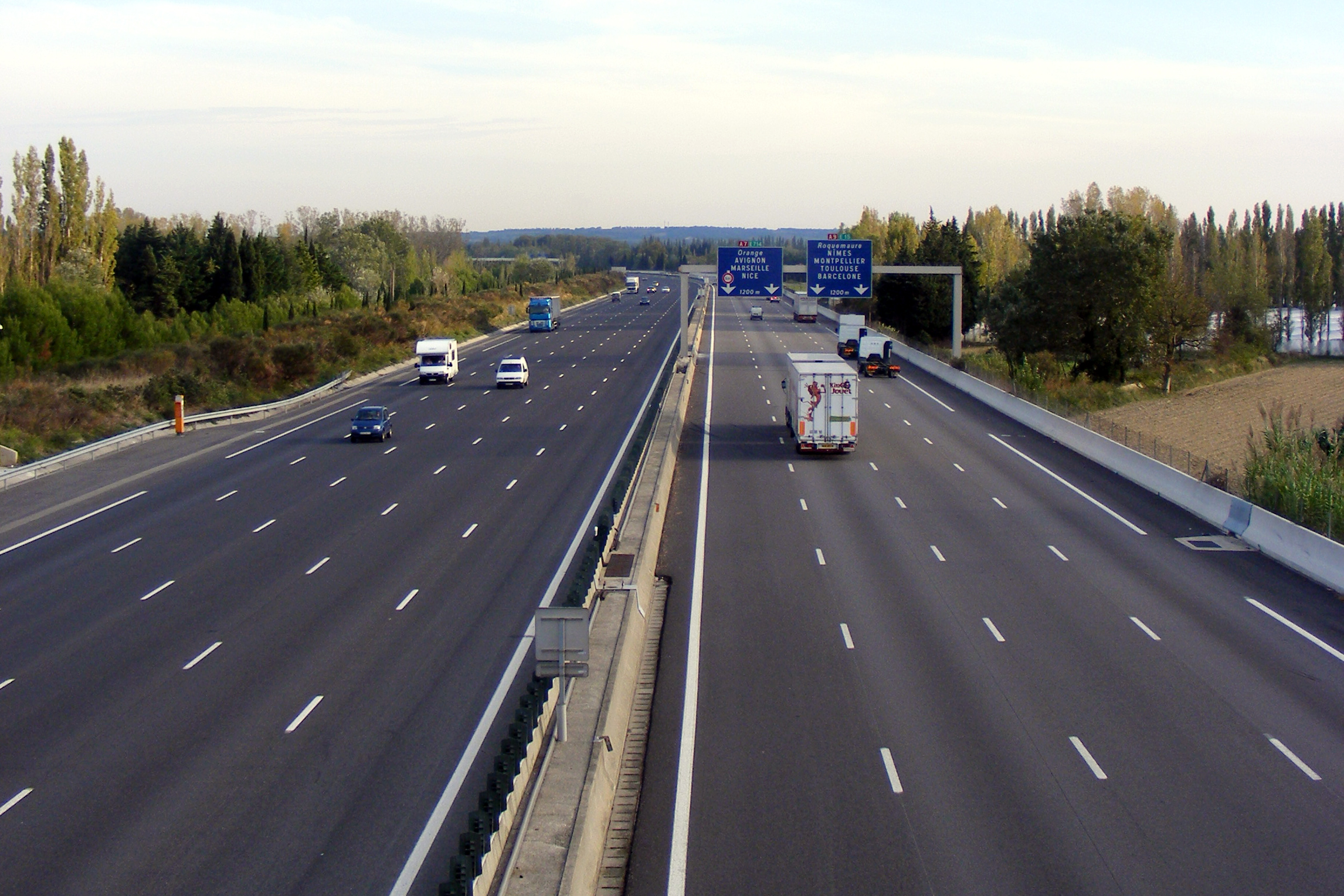 Échangeur de l'A7 et de A9 à Orange (Vaucluse) situé à 1km.